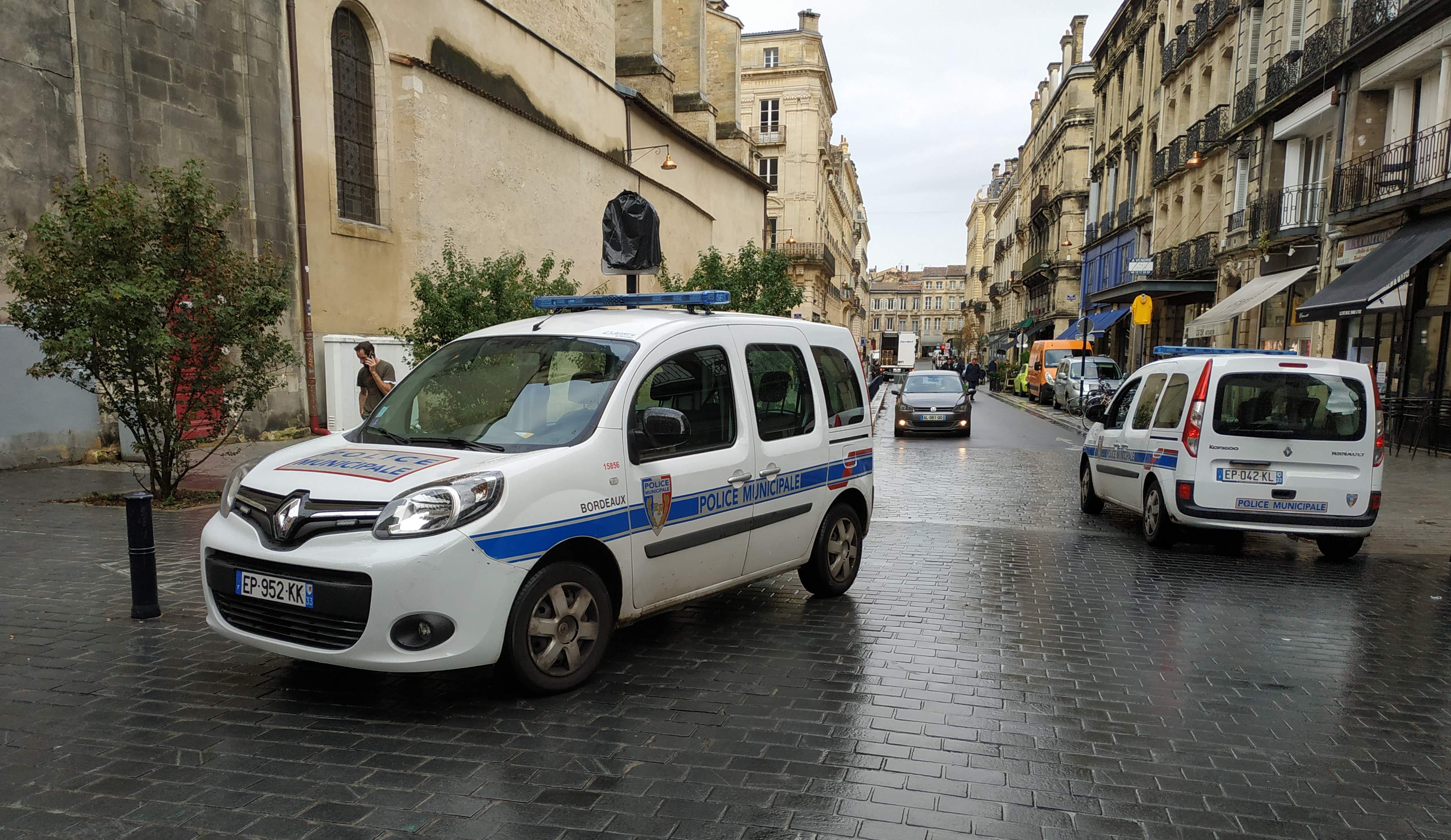 Renault Kangoo de la police municipale de Bordeaux